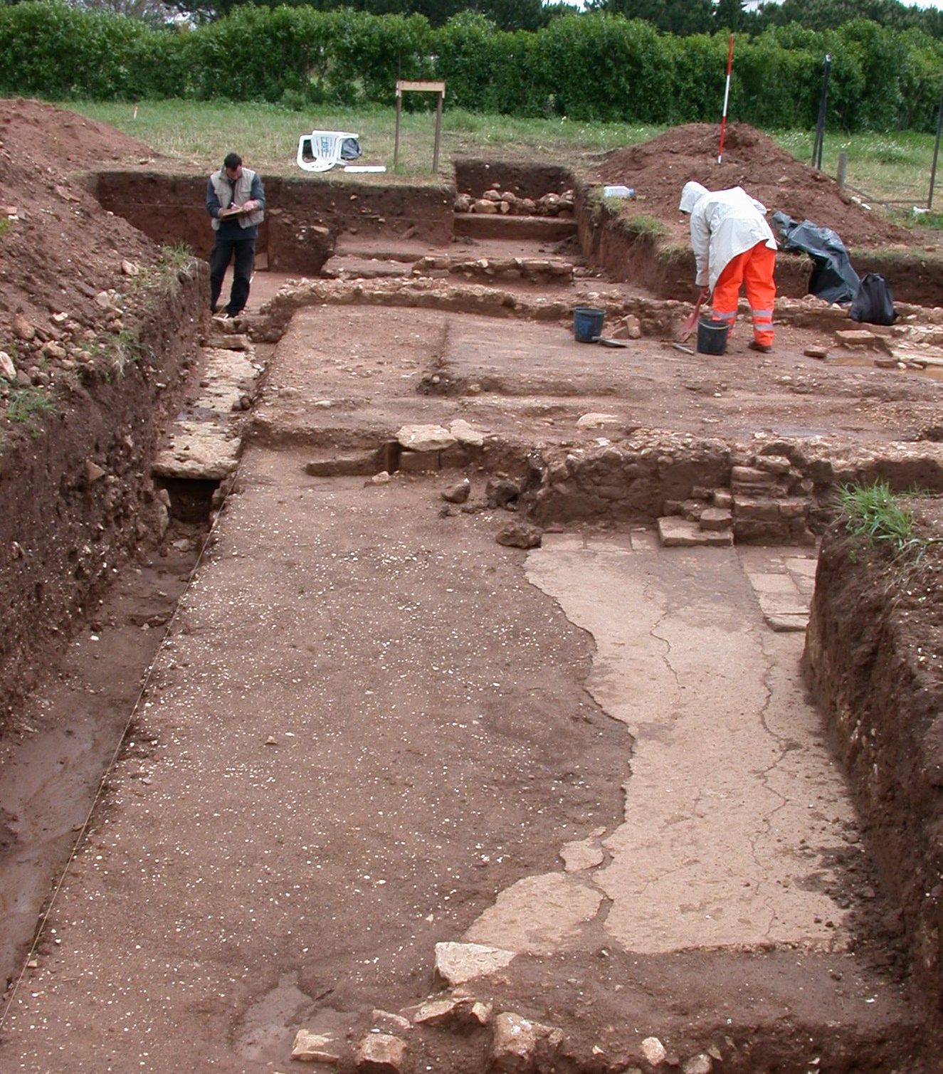 Blick von Nordwesten auf die fabrica im Osten der Ruinen während der Ausgrabungen 2002.